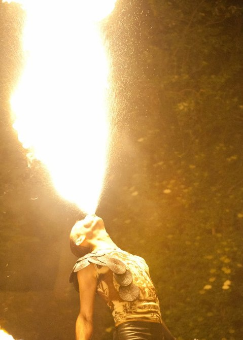 Sputafuoco della compagnia di spettacoli Lumen Invoco